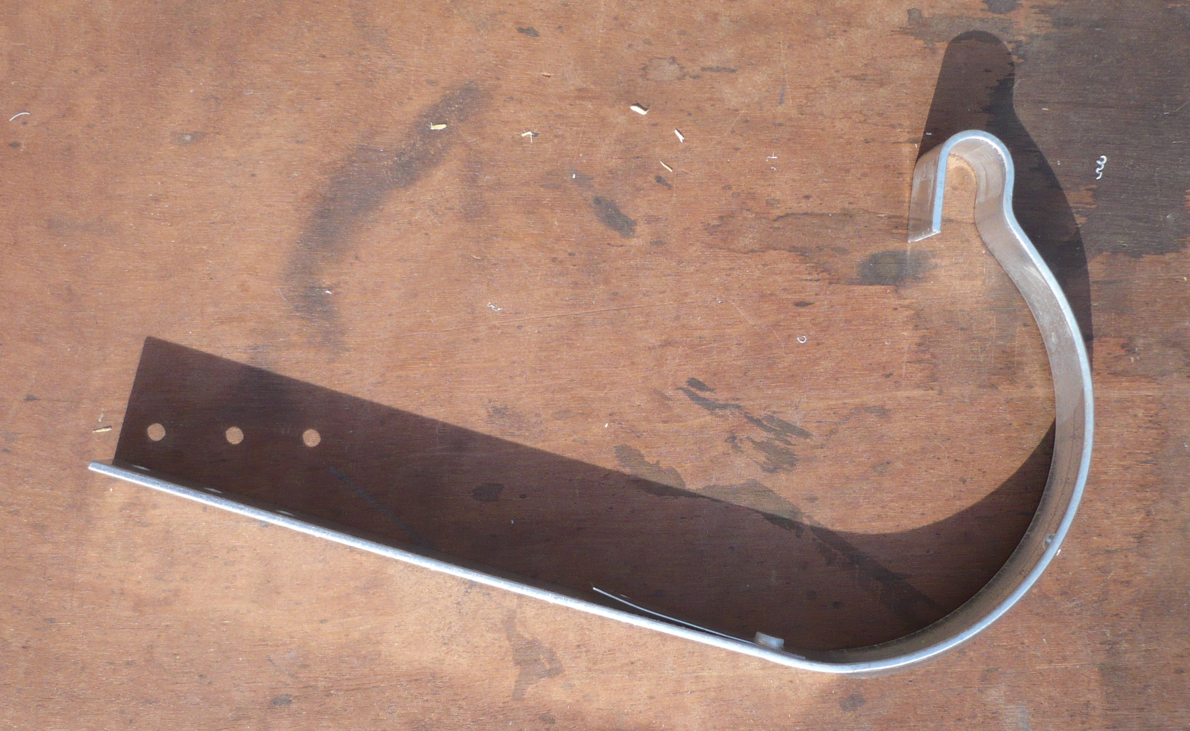 Un crochet rouennais, destiné au support d'une gouttière ronde.